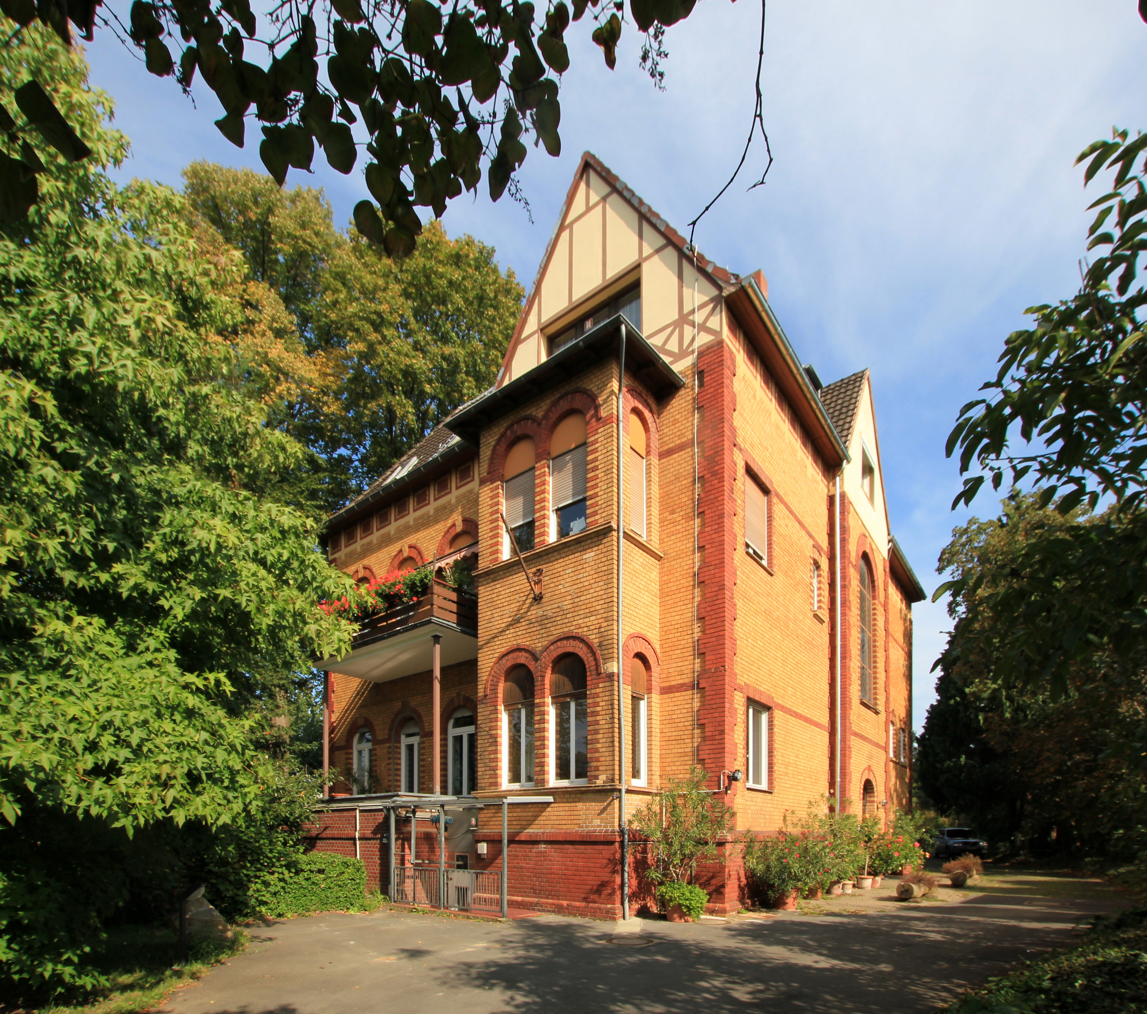 Erftstadt-Kierdorf, Friedrich-Ebert-Straße 104, Forstamt RWE Power